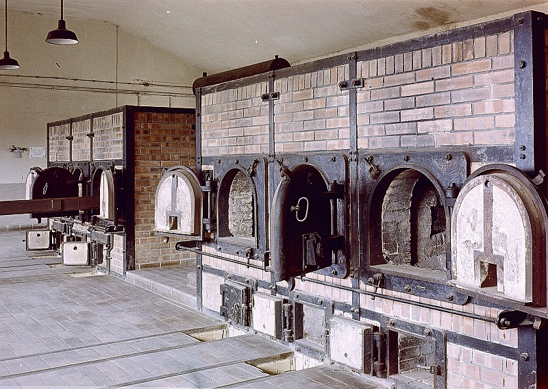 Original image description from the Deutsche FotothekWeimar-Buchenwald. Nationale Mahn- und Gedenkstätte Buchenwald, Verbrennungsraum mit Verbrennungsanlage der Firma Topf und Söhne, Erfurt